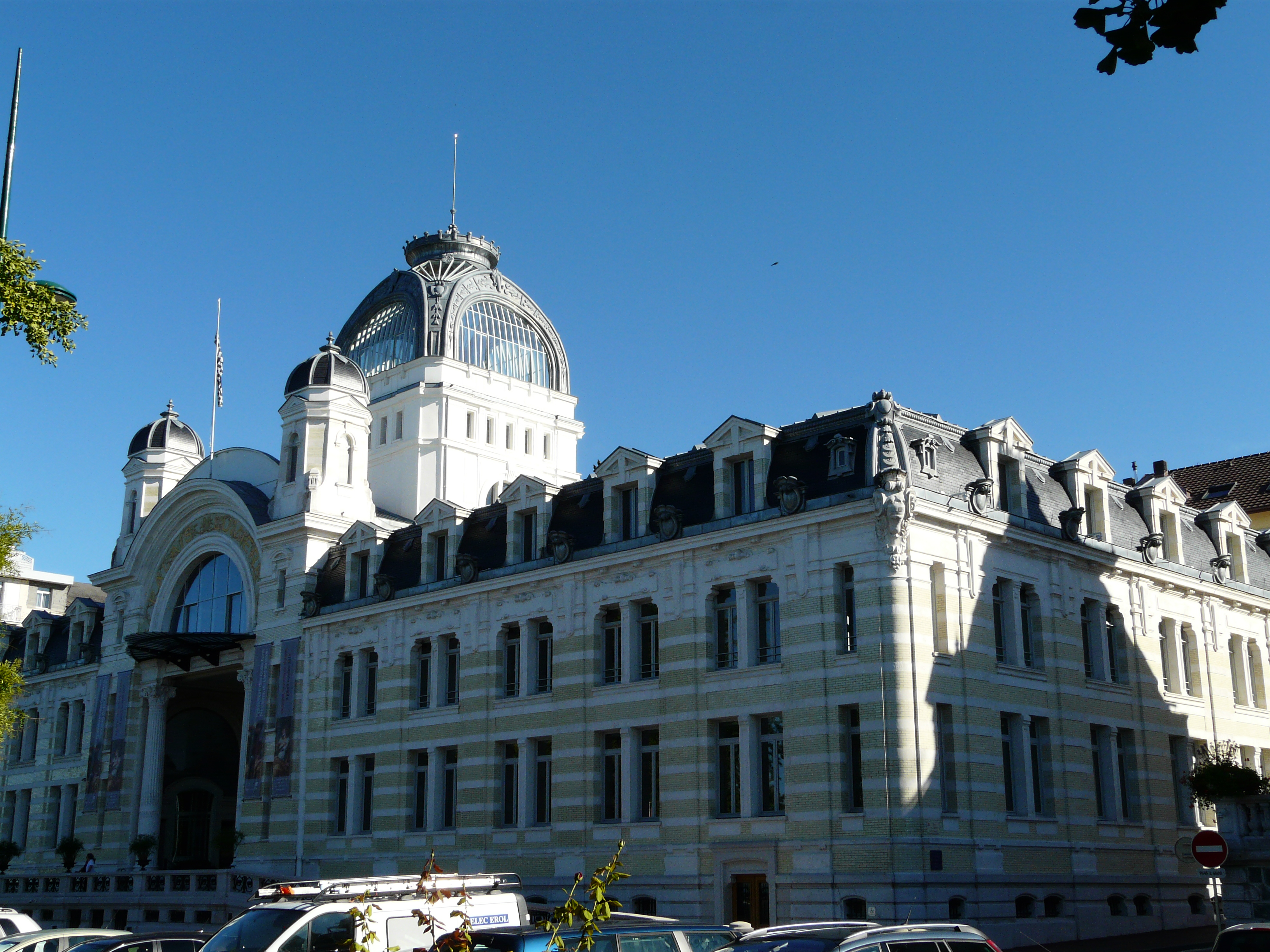 aujourd'hui "Palais Lumière" : façade principale